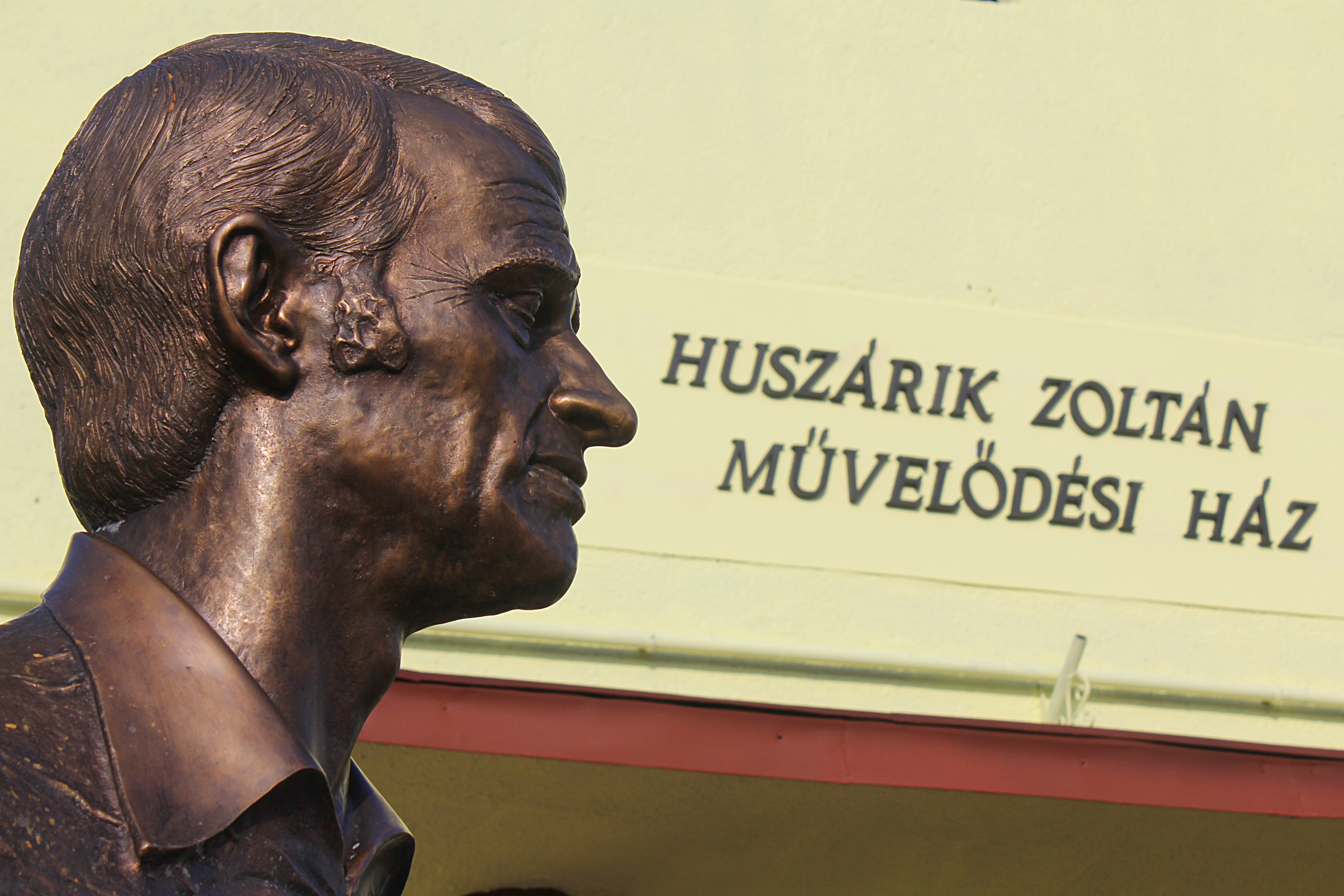 Domony, művelődési ház Esemény: Huszárik Zoltán szobor avatása (szobrász: Monori Sebestyén)